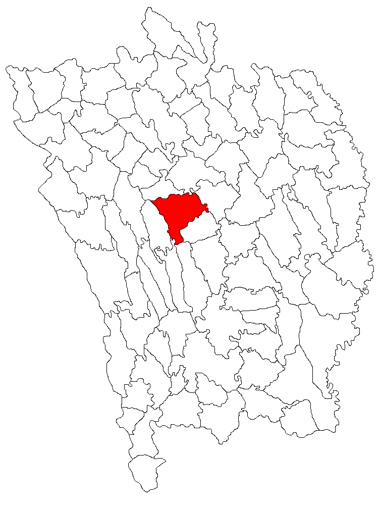 Categorie:Hărţi ale judeţului Vaslui